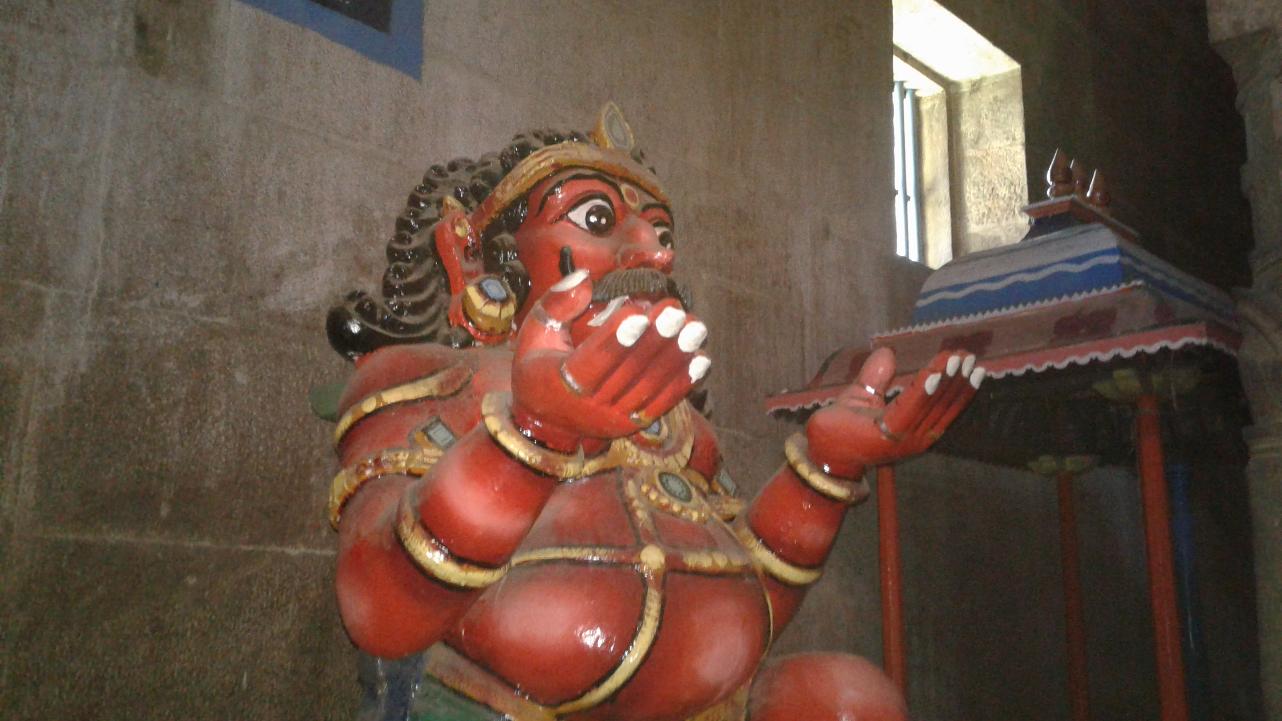 பூதவாகனம் பராய்துறைநாதர் கோயில்